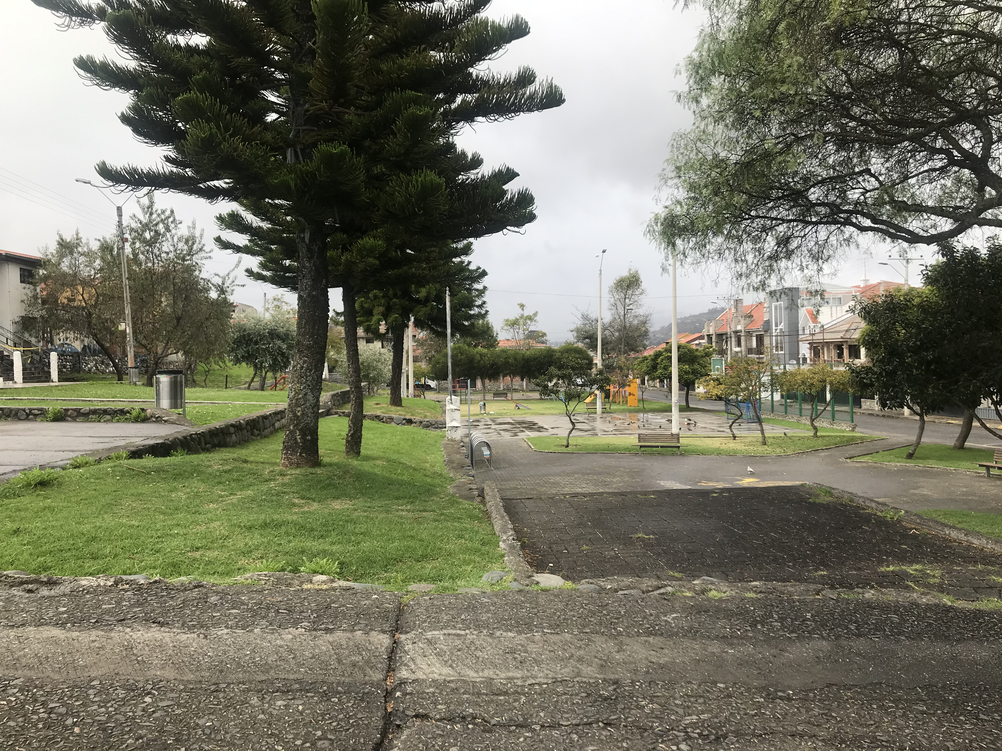 Parque reina de la Paz vista lateral